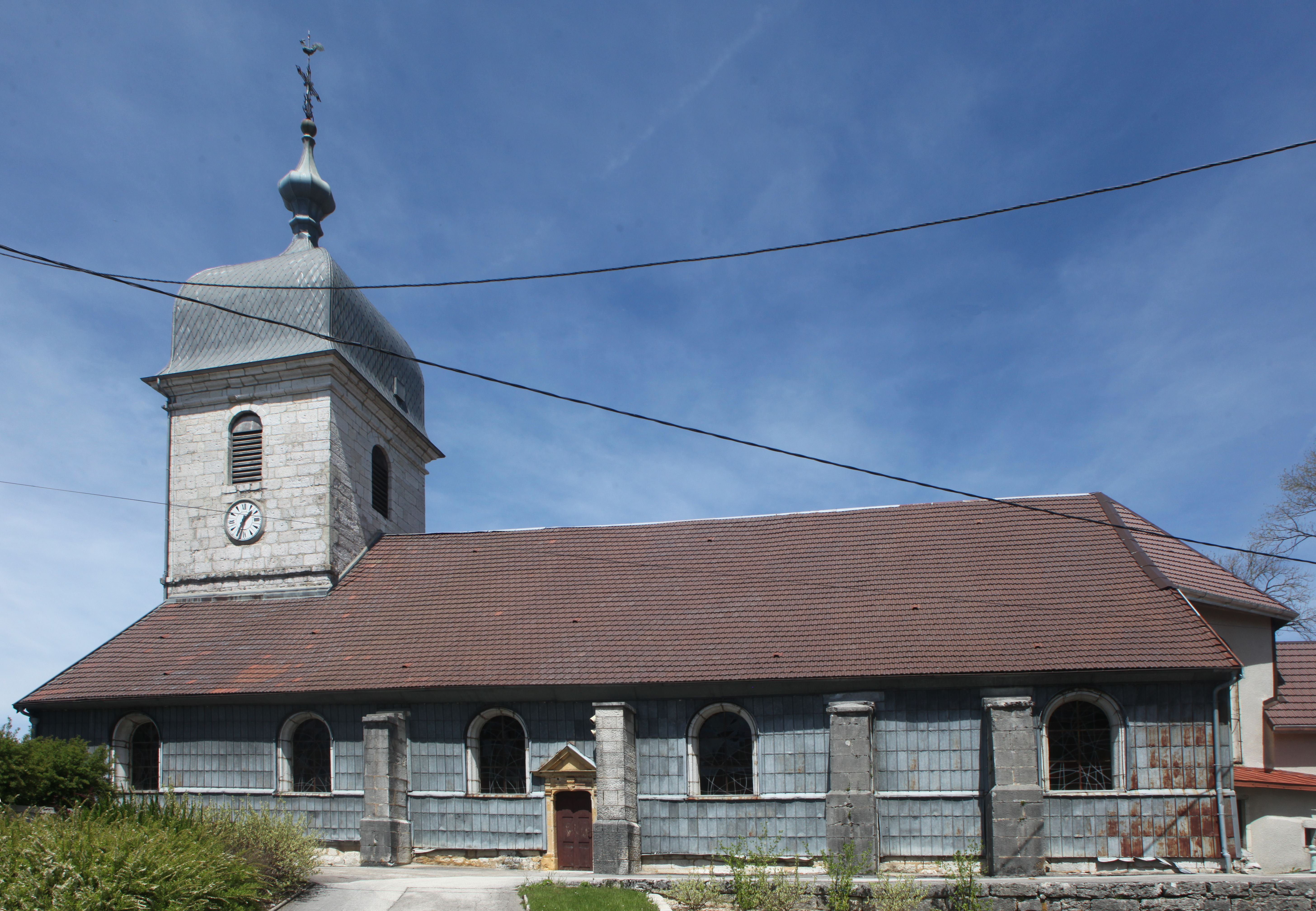 Église de Mignovillard (Jura).